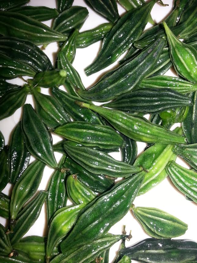 A kind of bitter-guard படம் - அதலைக் காய். இது பாகல் வகையில் ஒன்று. கசக்கும் சுவை கொண்டது. நீரிழிவு என்னும் சர்க்கரை நோயைக் கட்டுக்குள் வைத்திருக்கும் எனப் பயன்படுத்தப் படுகிறது.